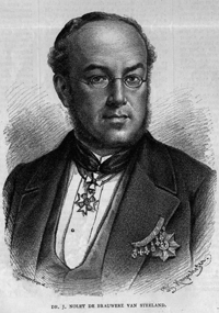 Gravure de Johannes Nolet de Brauwere réalisée d'après un portrait de Louis Tuerlincks.